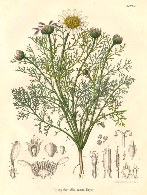 Anacyclus officinarum